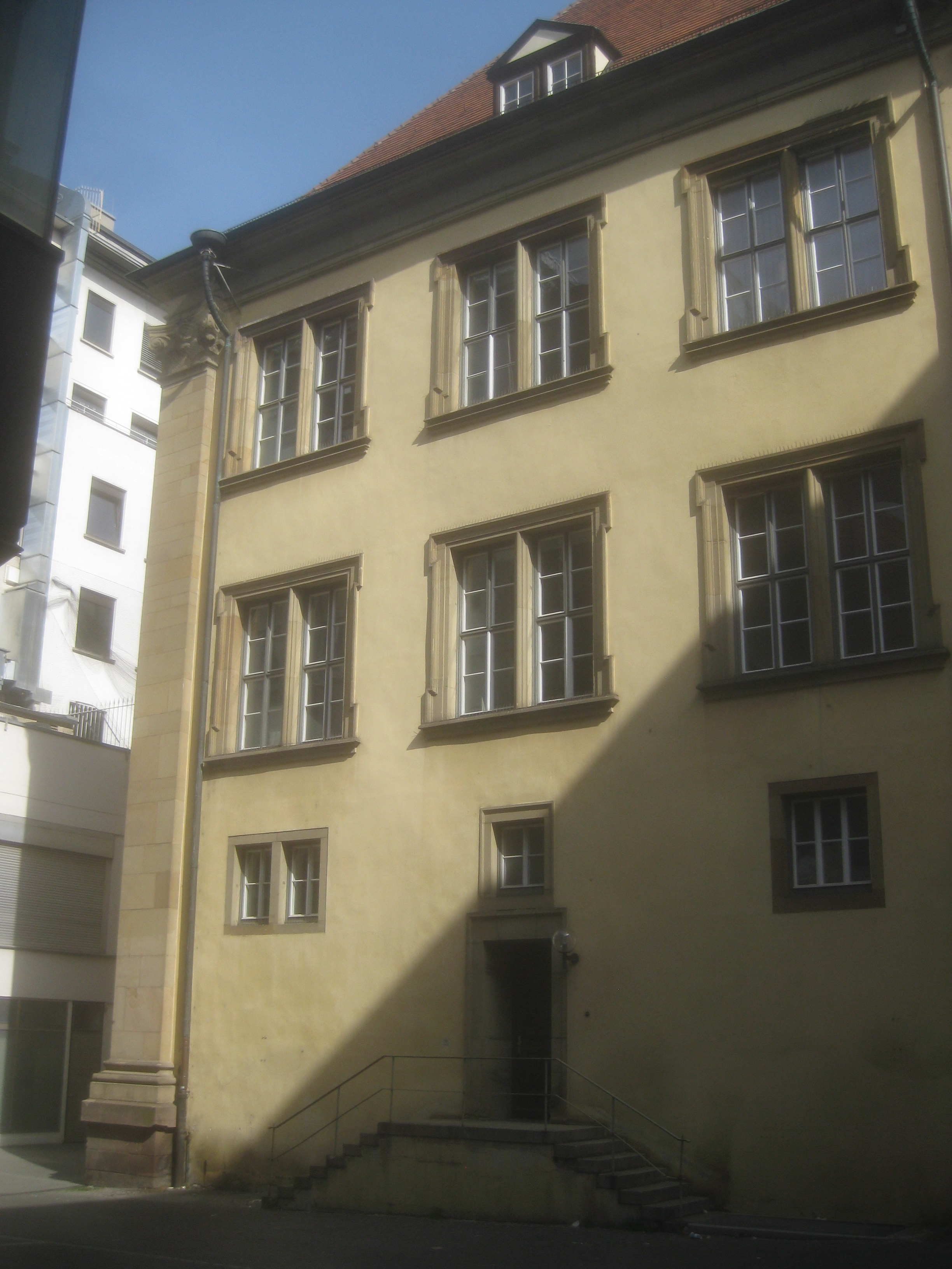 Linke Seitenfront des Prinzenbaus in Stuttgart (vom Schillerplatz aus).